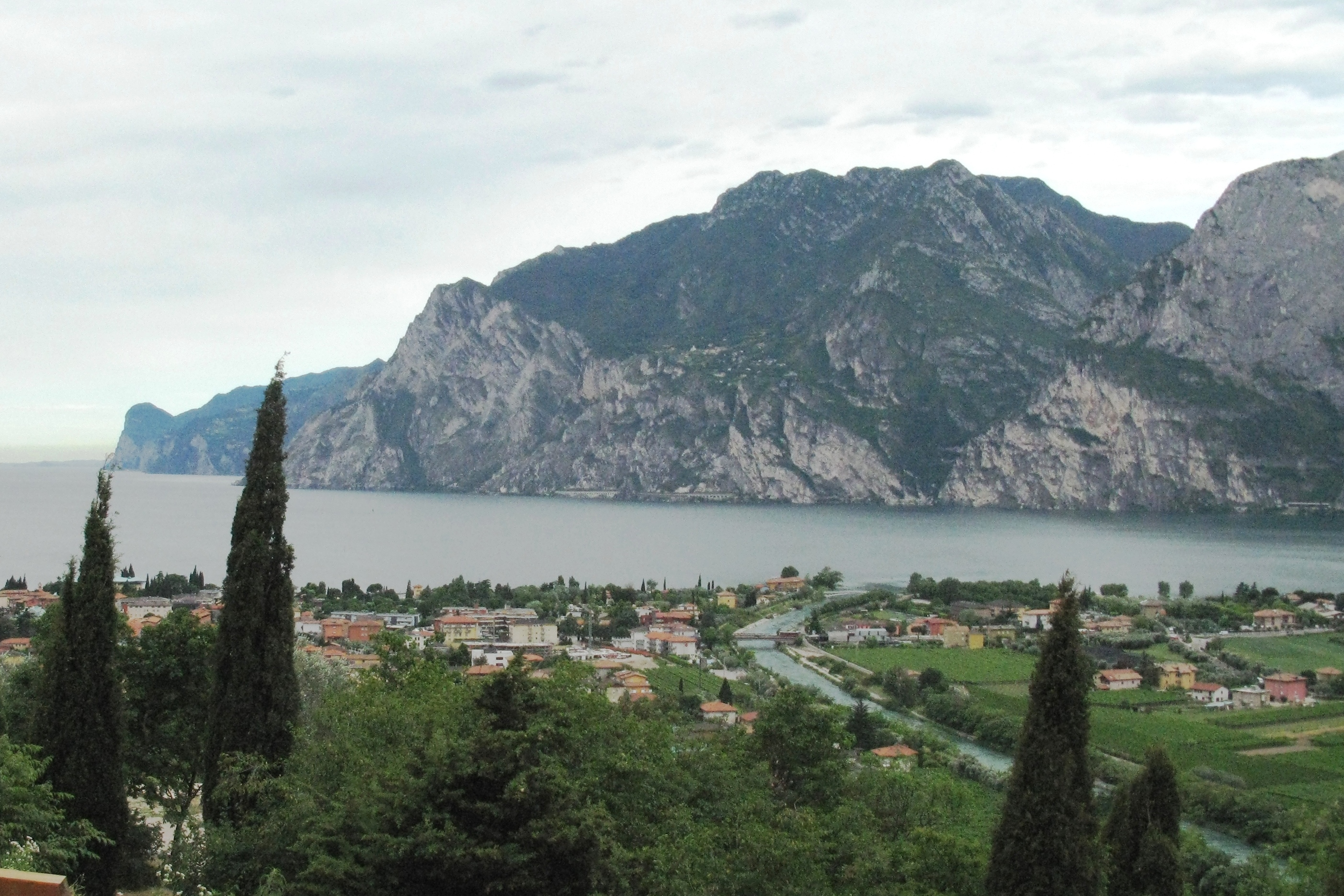 Vue op Torbole mam Floss Sarca. Kategorie:Uertschaften an Italien